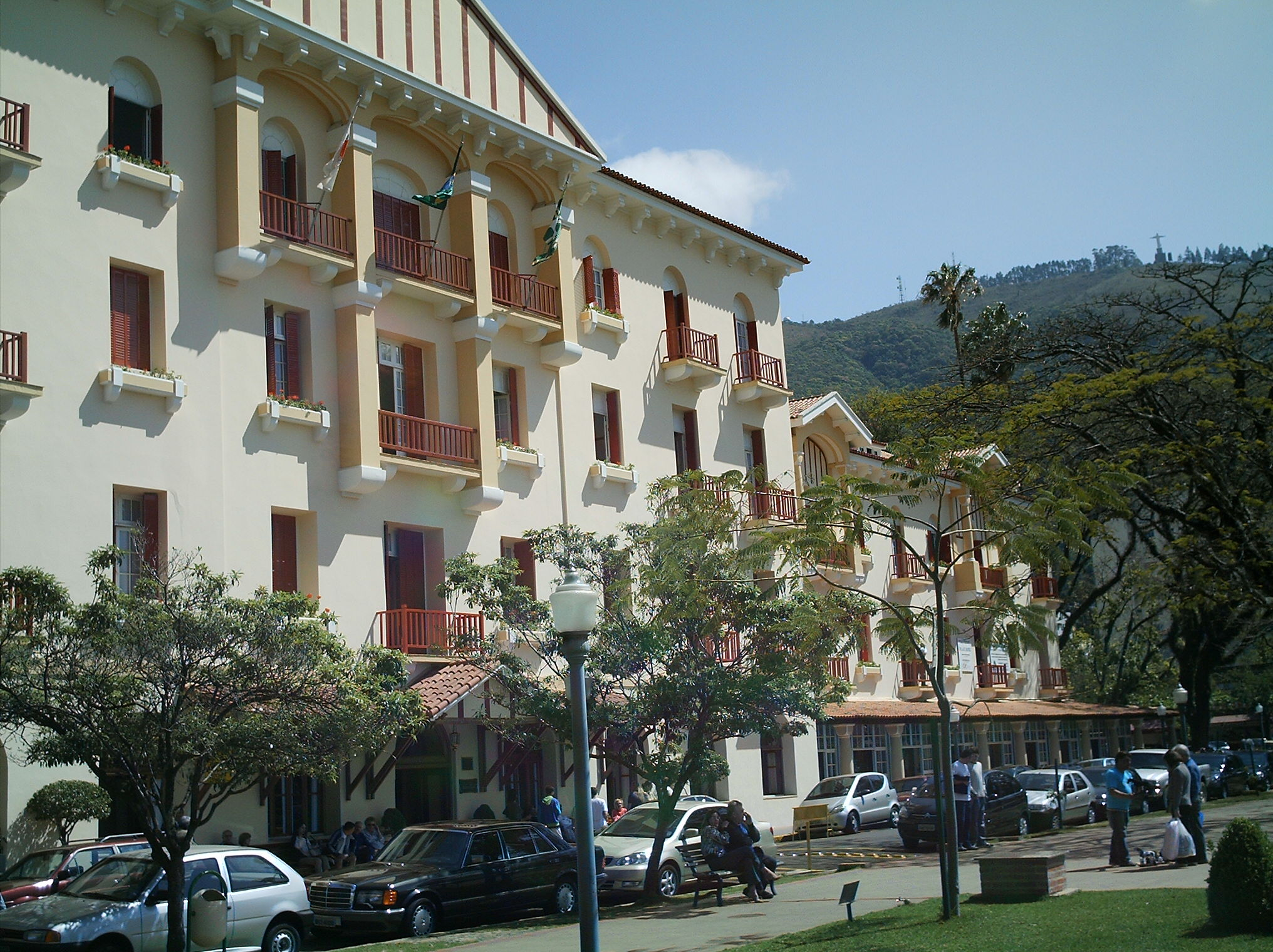 (2006) Fachada do Palace Hotel, em Poços de Caldas, MG